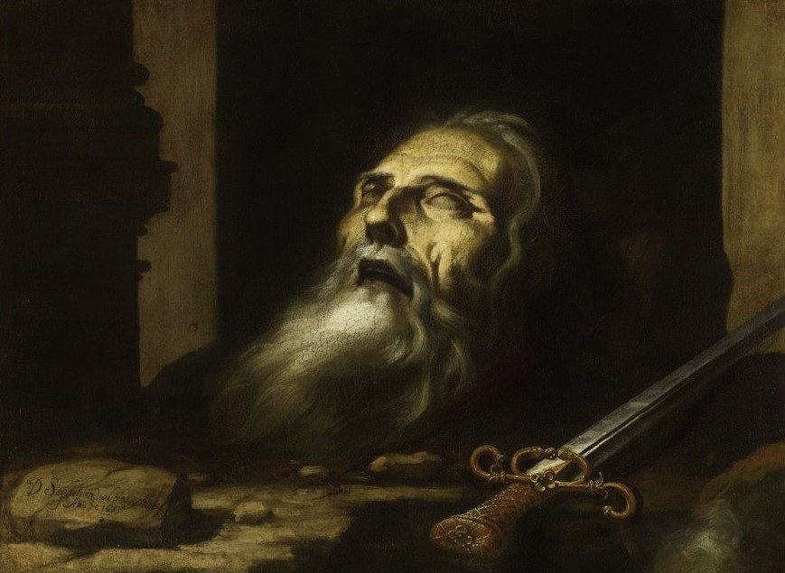 Cabeza cortada de un santo mártir, óleo sobre lienzo, 53 x 72 cm, Paría, Museo del Louvre